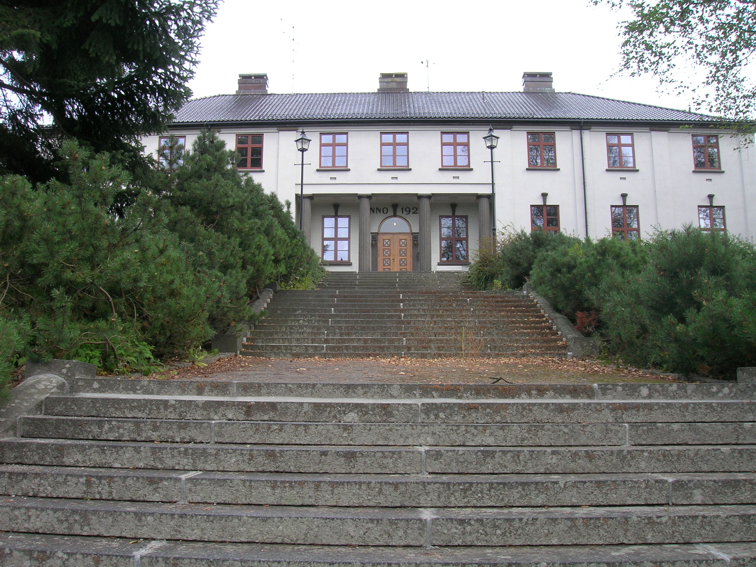 Tinghaug, Nøtterøy